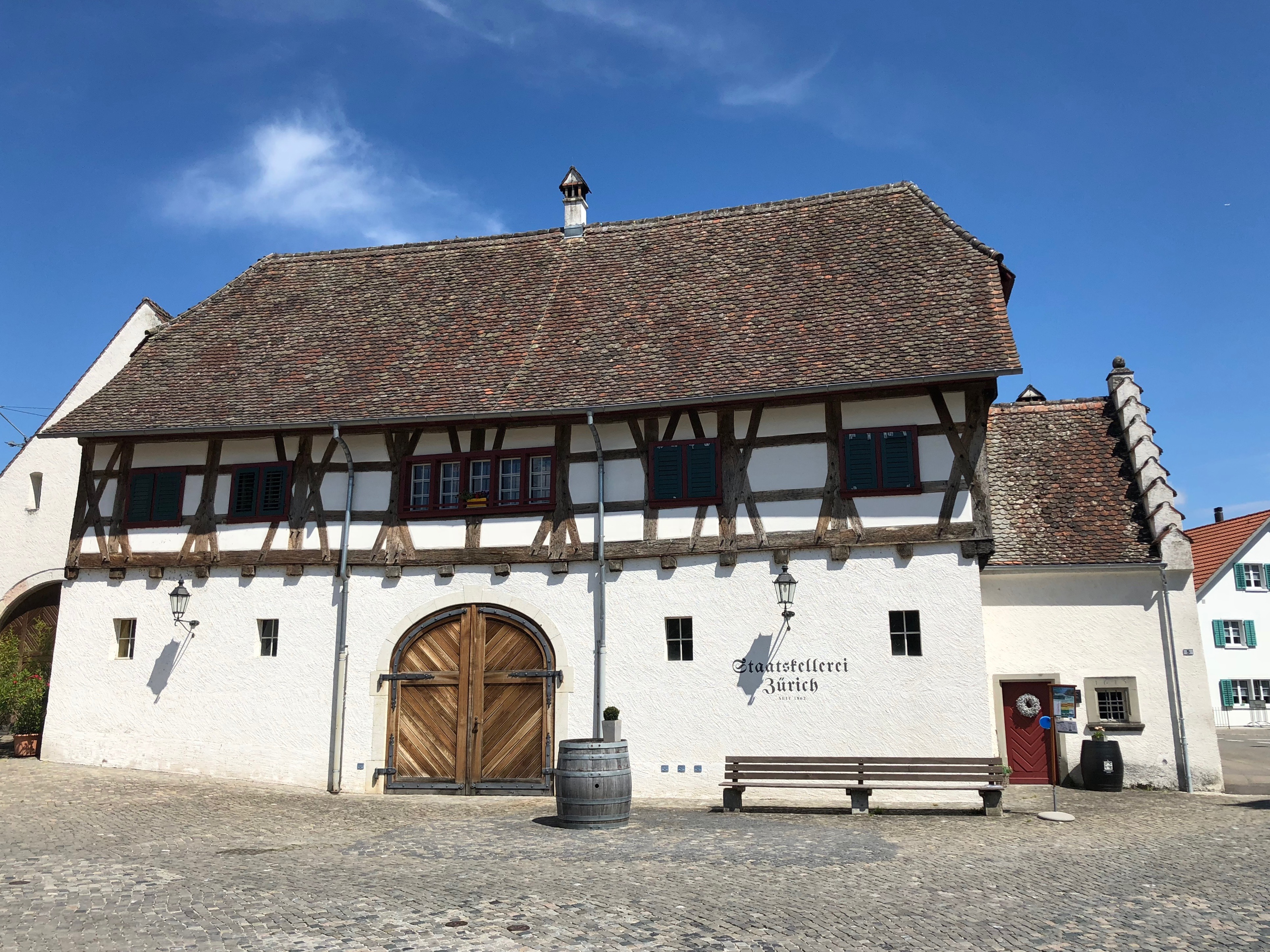 Kloster Rheinau Staatskellerei